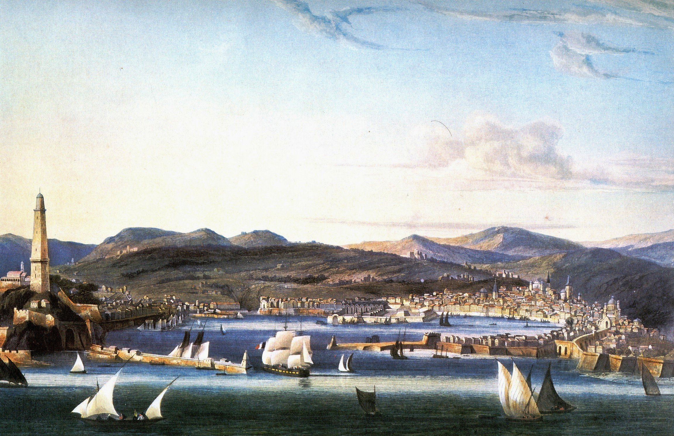 Veduta di Genova - acquatinta, 1810 circa